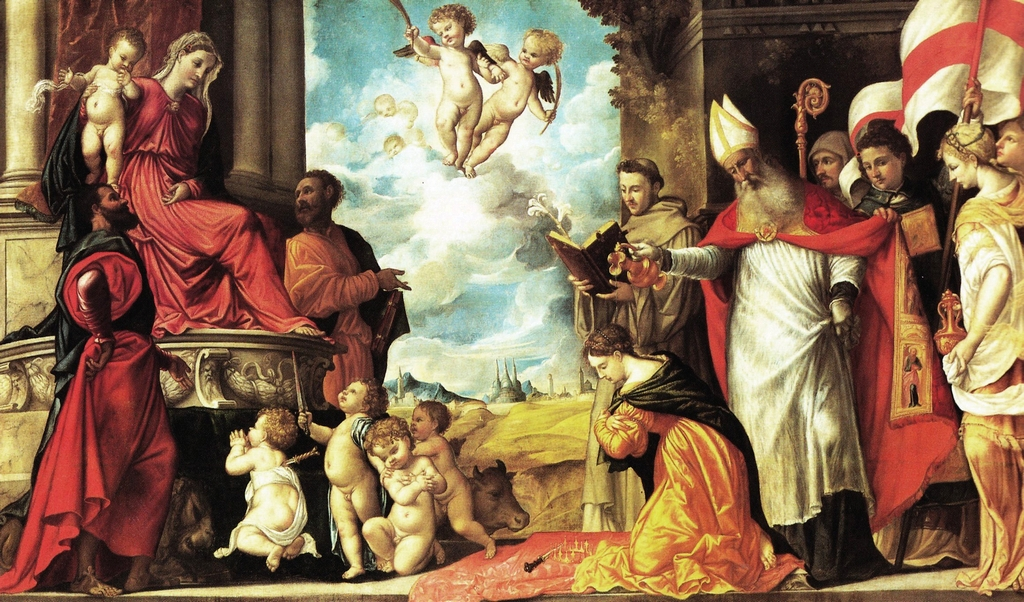 Domenico Campagnola - Madonna in trono con Bambino e Santi, 1537 250 x 410 cm olio su tela Musei Civici Padova